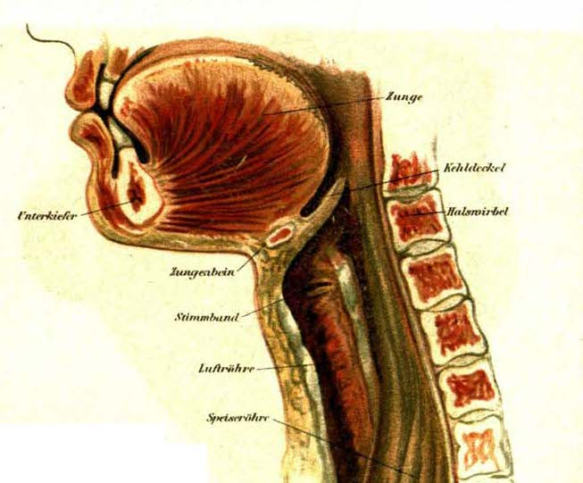 Meyer Konversationslexikon 4. Auflage Band 8 Seite 33 Quelle